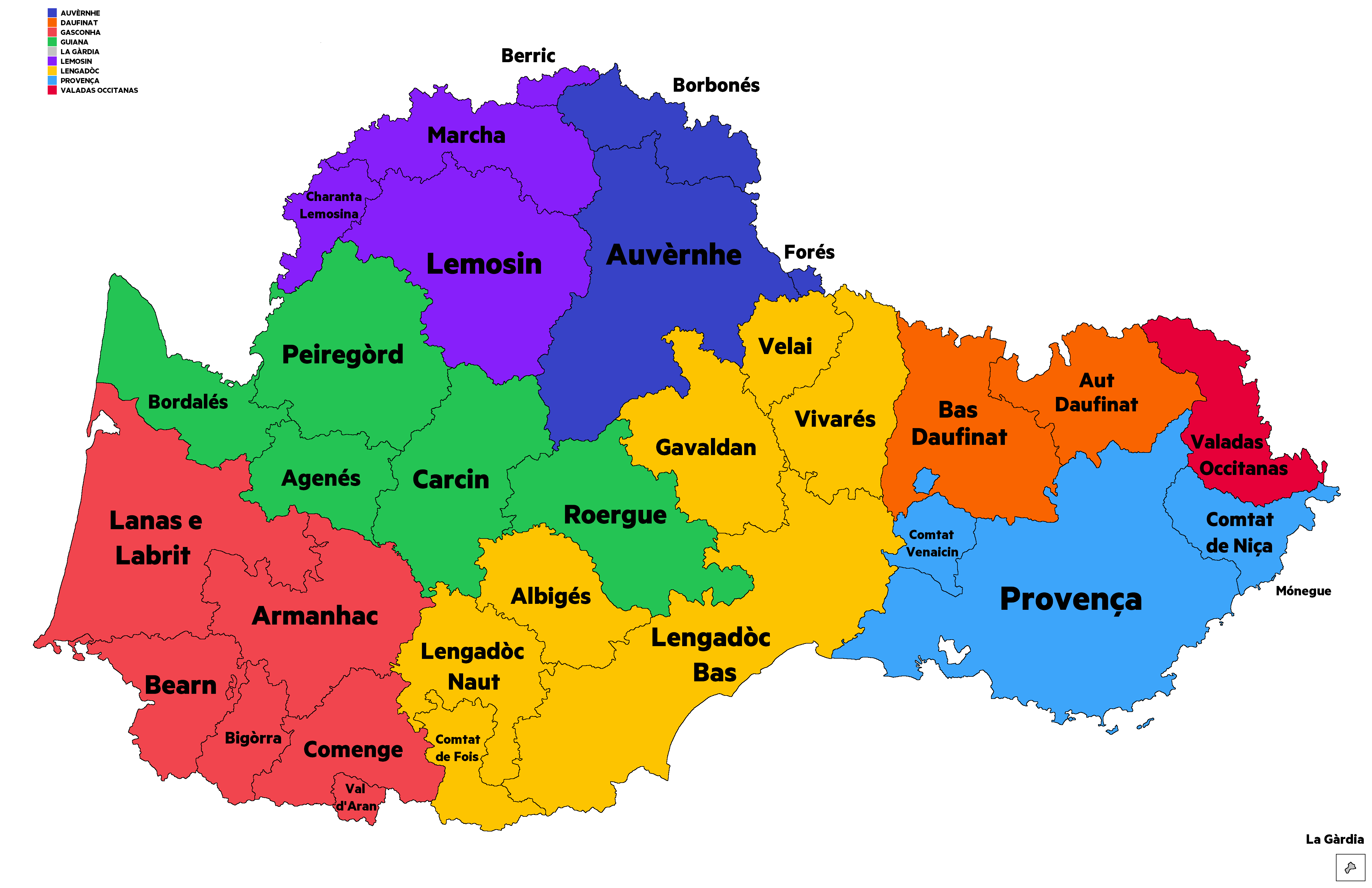 Regions i sosregions d'Occitània